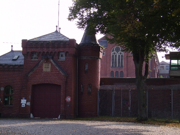 JVA-Fuhlsbüttel (Santa Fu) vom Hasenberge aus